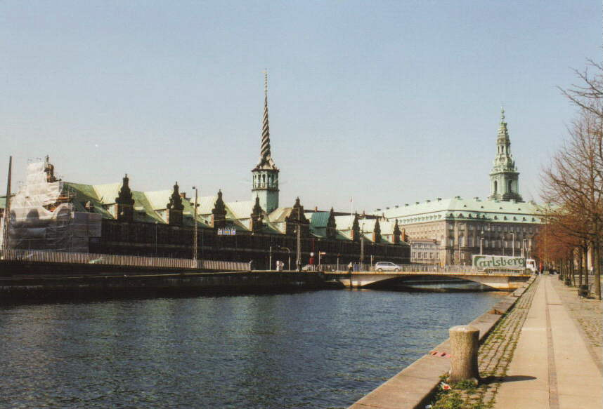 Börse und Schloss Christiansborg in Kopenhagen